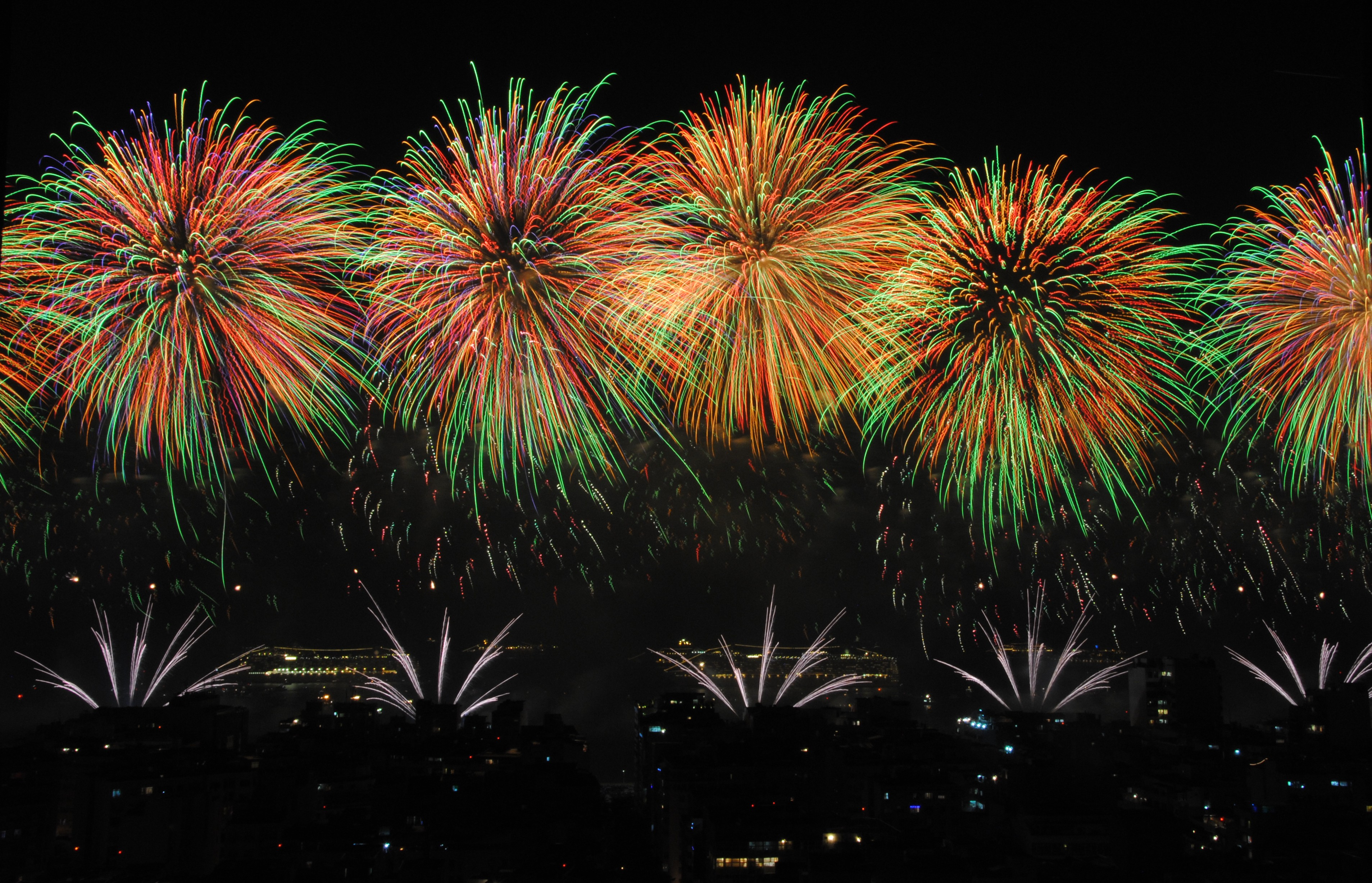 Rèveillon 2013 - Copacabana - Rio de Janeiro.